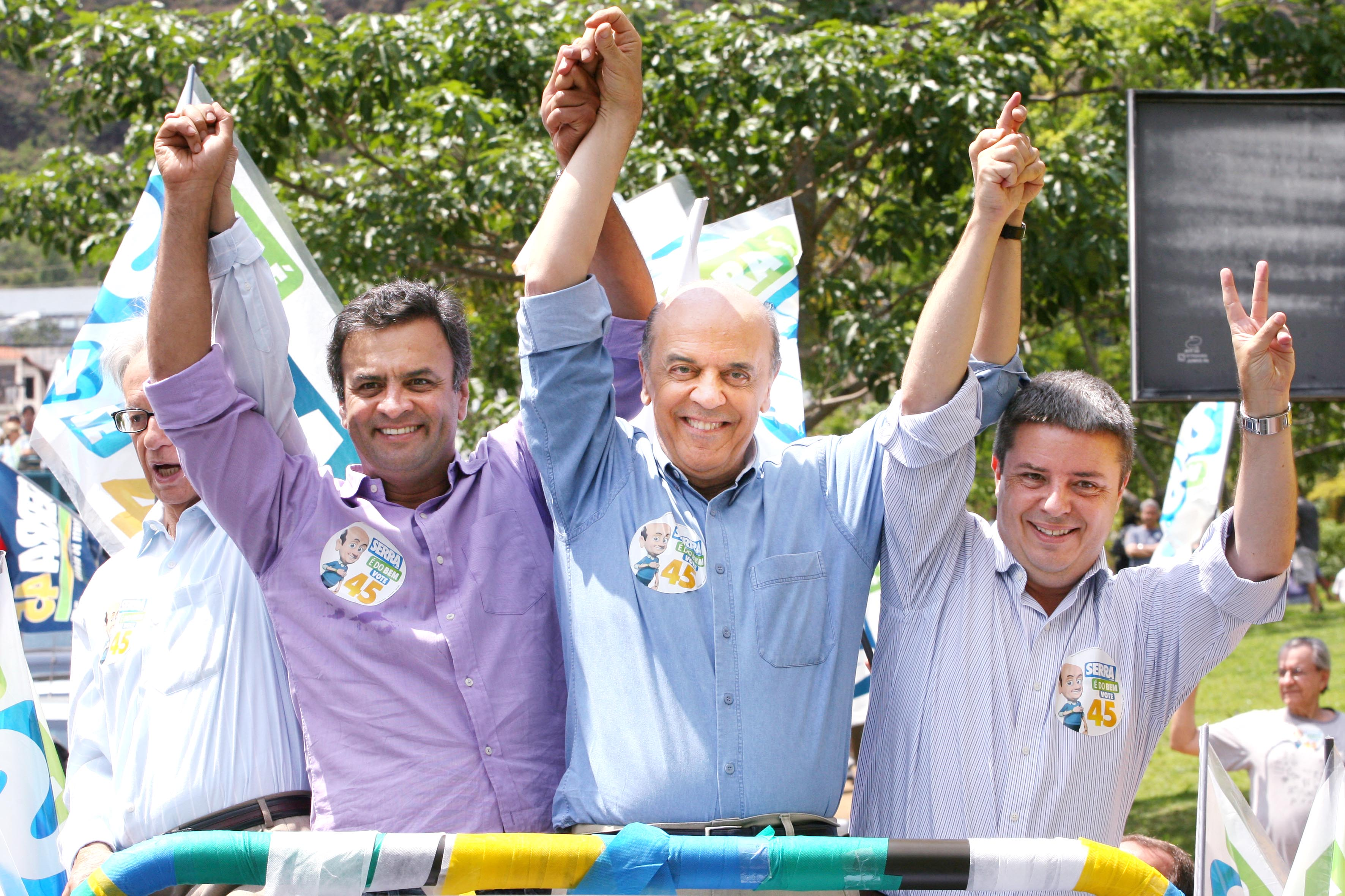 O ex-governador e senador eleito por Minas Gerais, Aécio Neves, juntamente com o candidato à presidência, José Serra, e o governador reeleito de Minas Gerais, Antônio Anastasia, durante o segundo turno da eleição presidencial no Brasil em 2010.